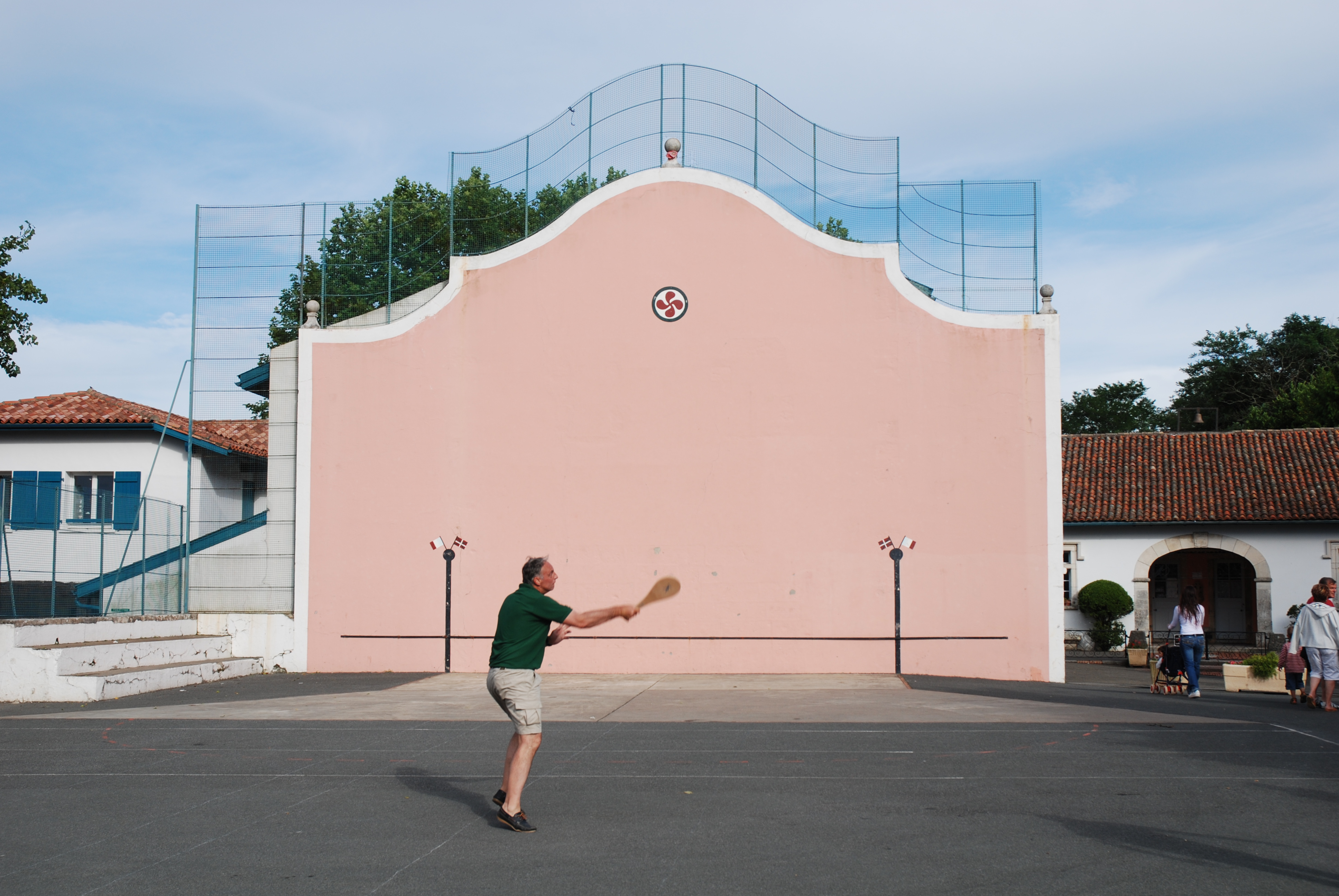 Arcangues, le fronton place libre